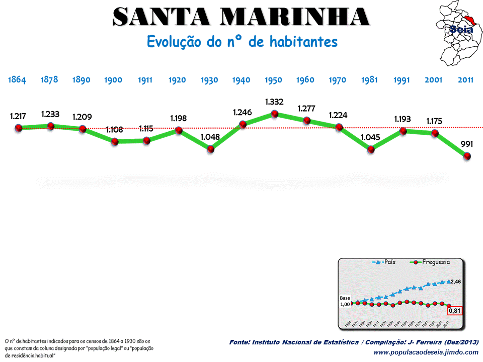 Evolução da População 1864 / 2011